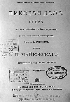 1-е издание